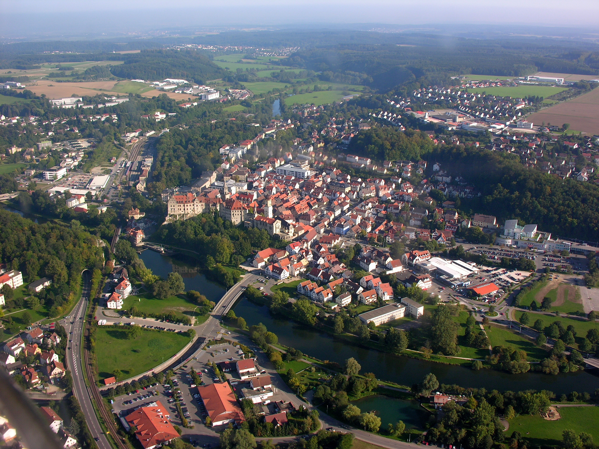 Germany, Baden-Württemberg, Aerial view of Sigmaringen